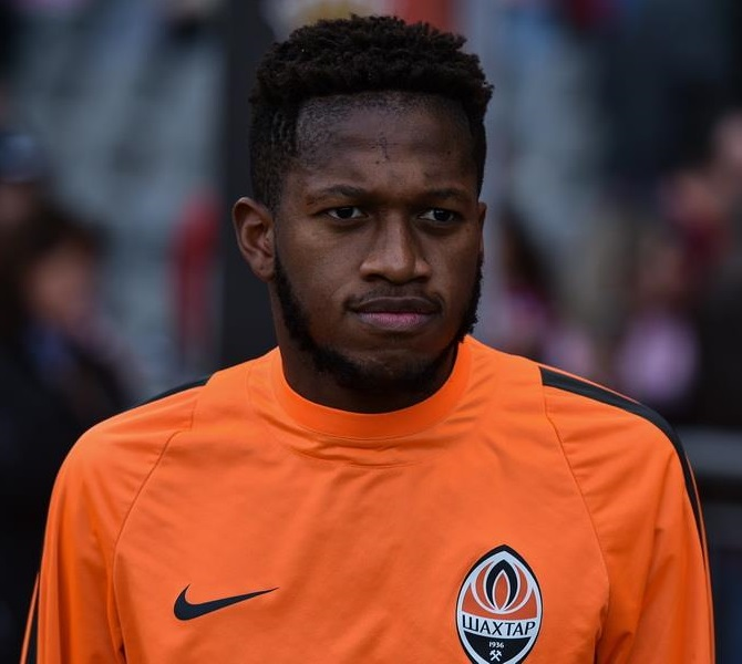 Фредерико Родригес Сантос — бразильский футболист